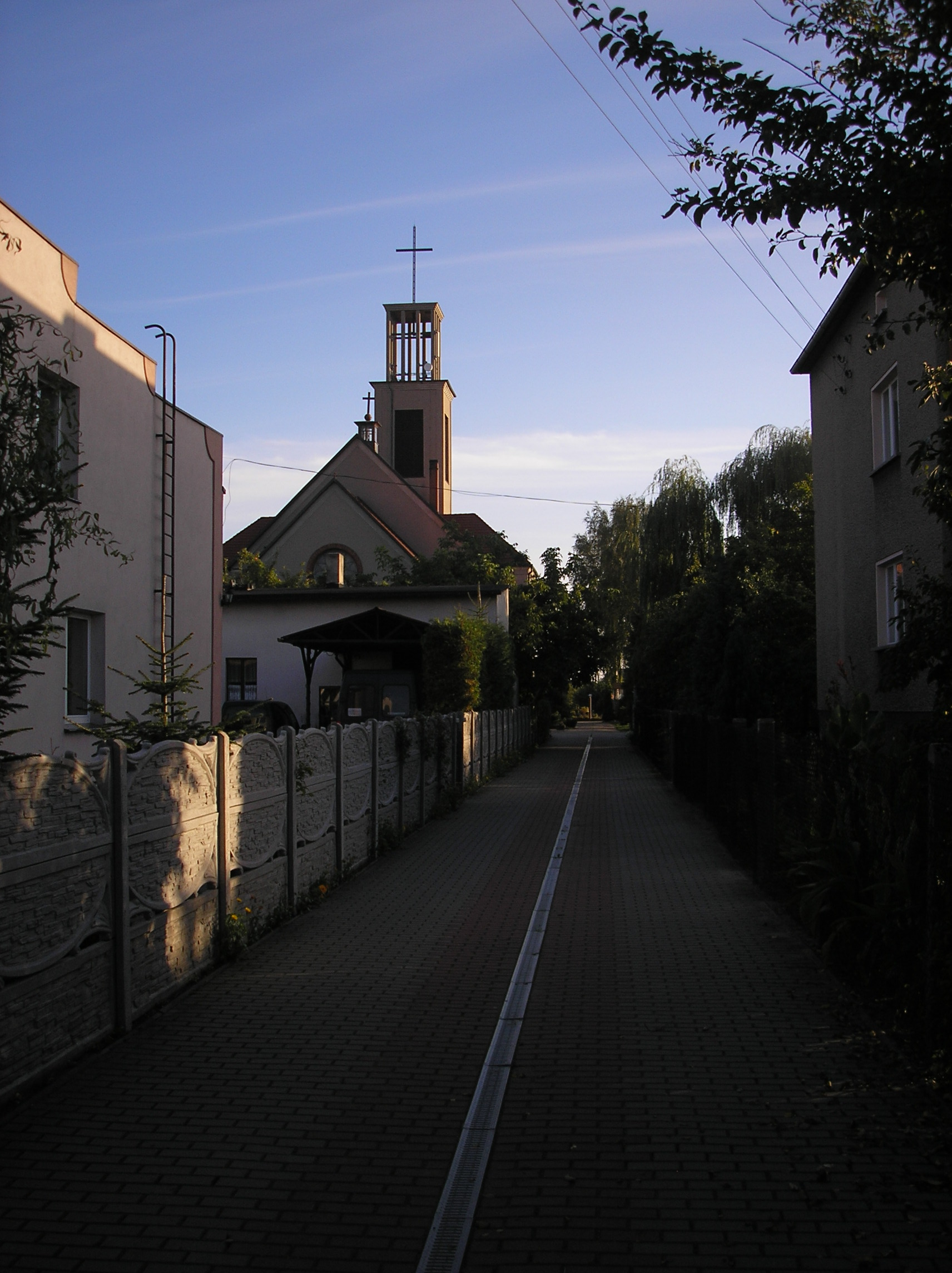 Strzebiński deptak (promenada)